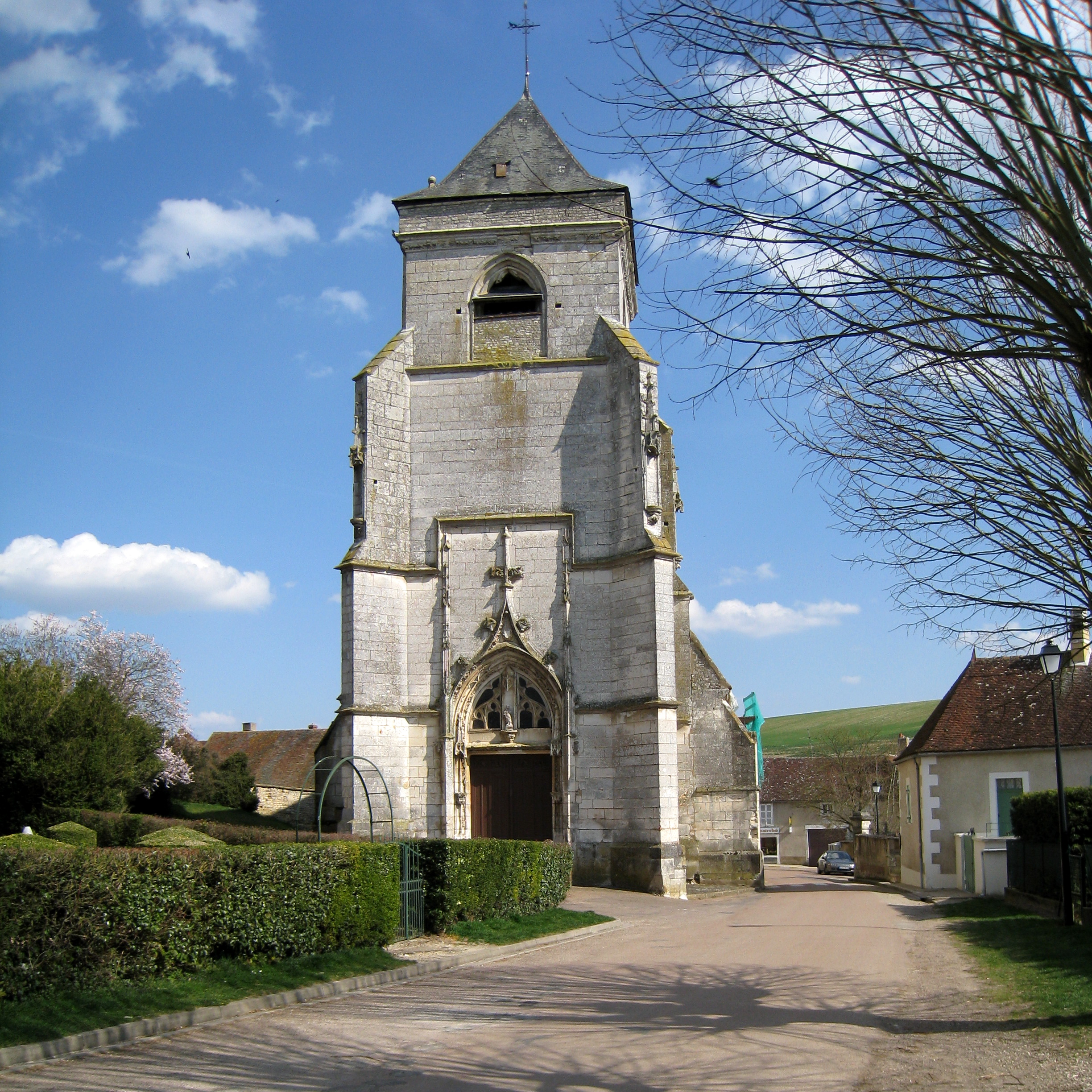 Eglise d'Ouanne, dans l'Yonne (France)